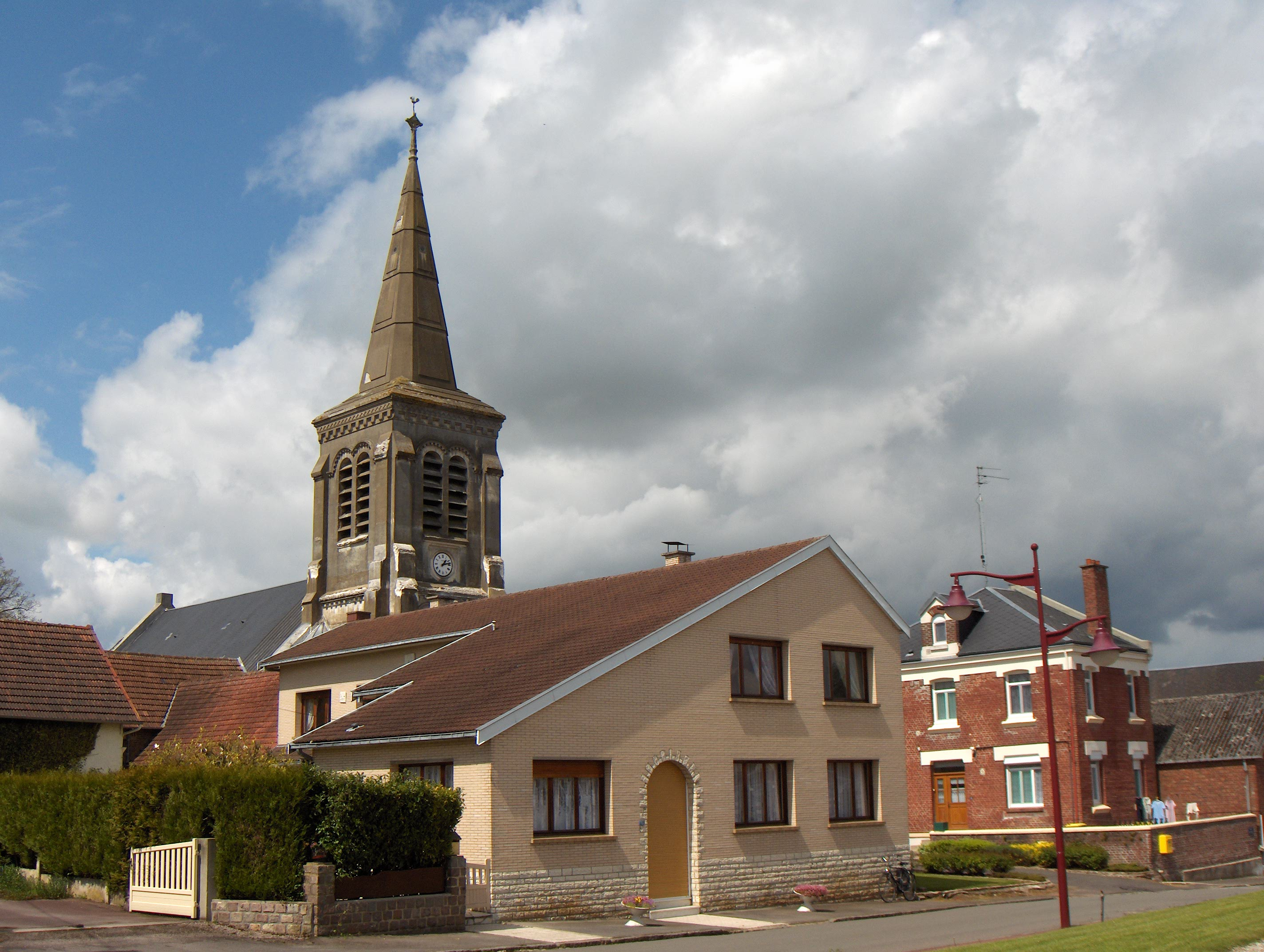 Berles-au-Bois (dépt. Pas-de-Calais, France), église